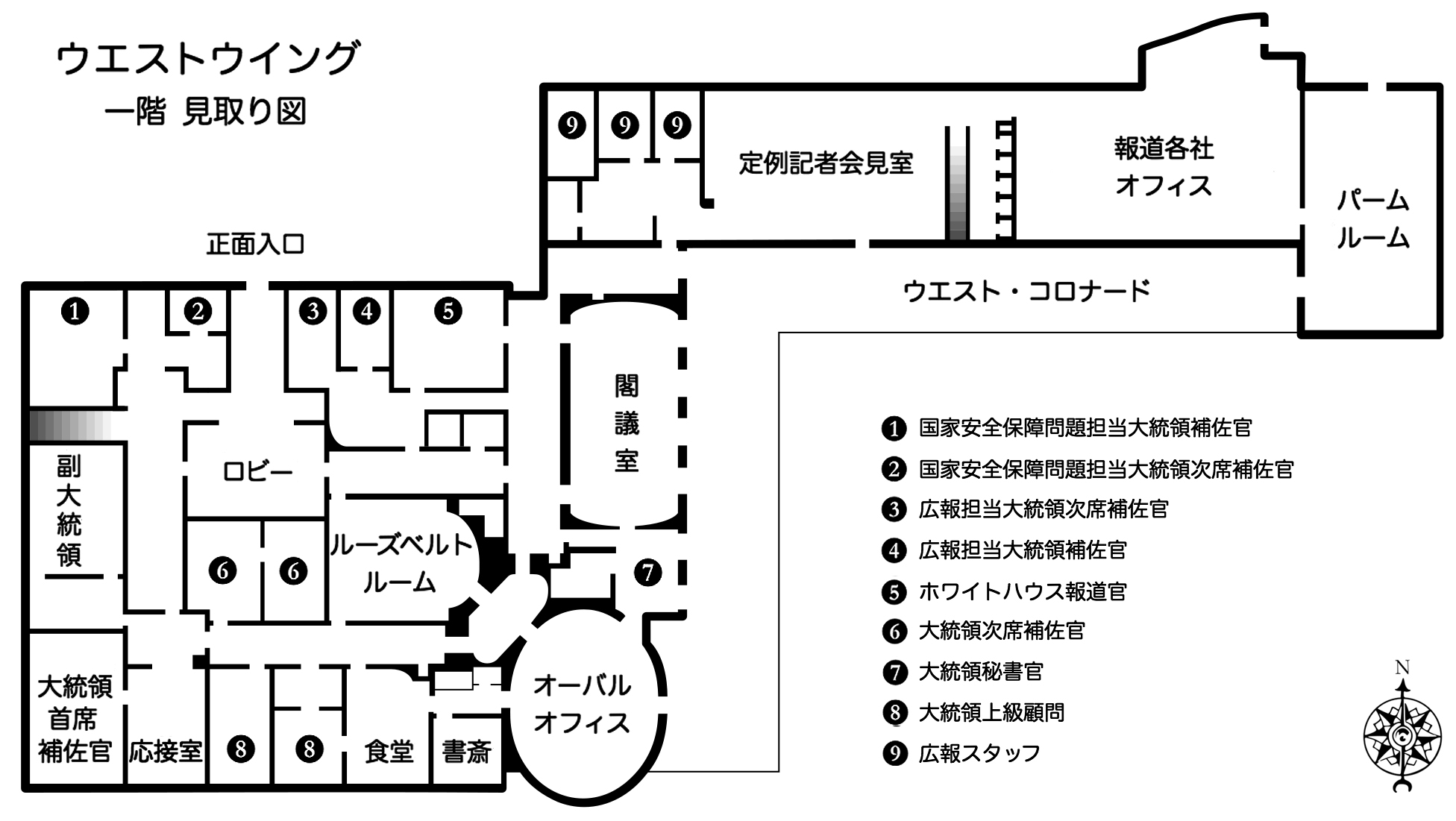 ウエストウイング一階見取り図